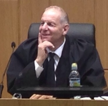 עודד מודריק